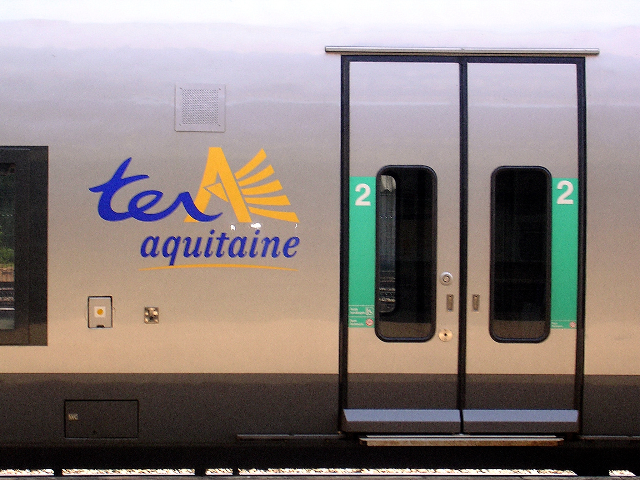 Gare de Mont-de-Marsan (Landes, France). Train Express Régional Aquitaine